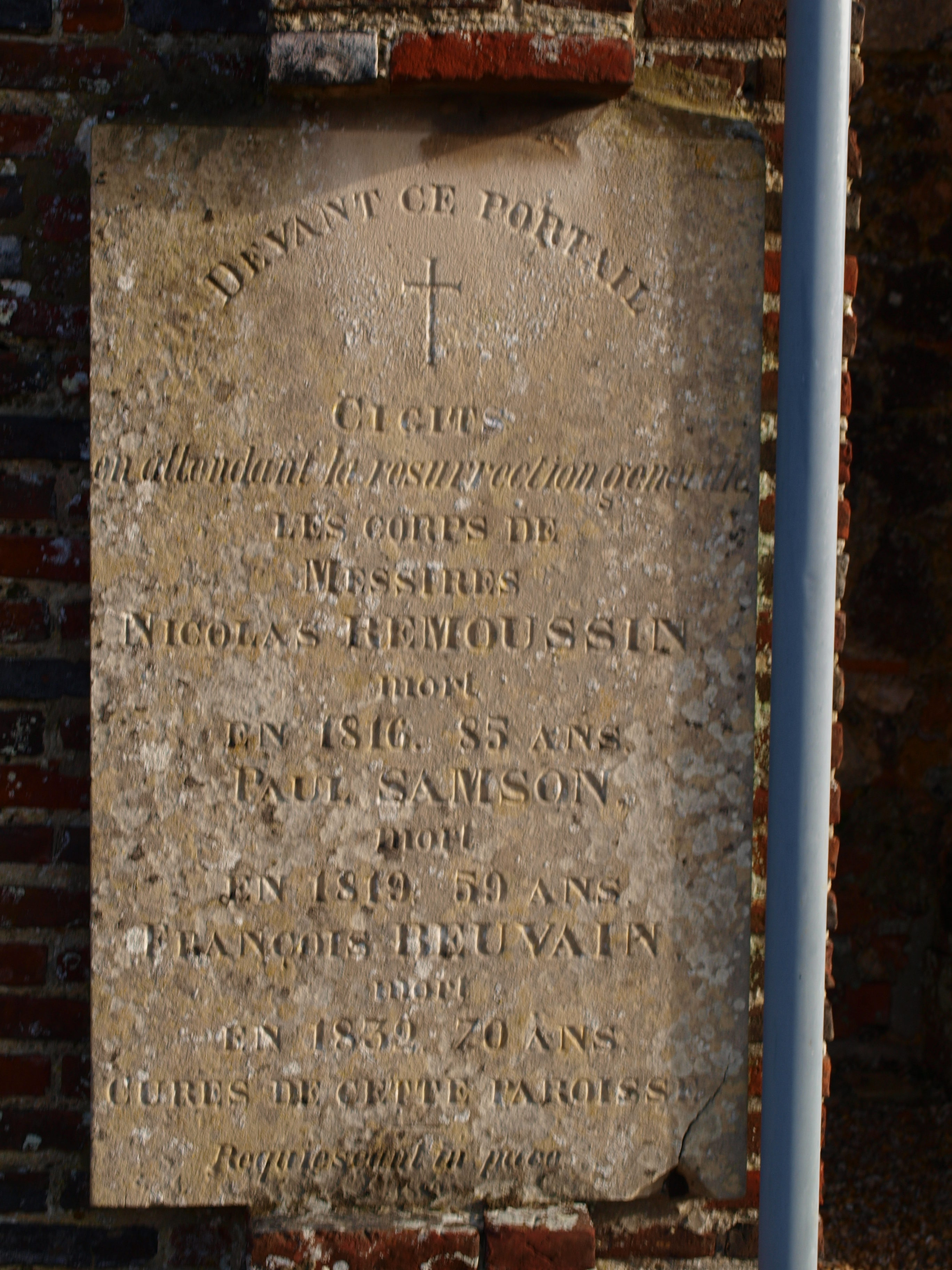 Esclavelles (Seine-Inférieure, France) ; plaque à l'entrée du porche de l'église